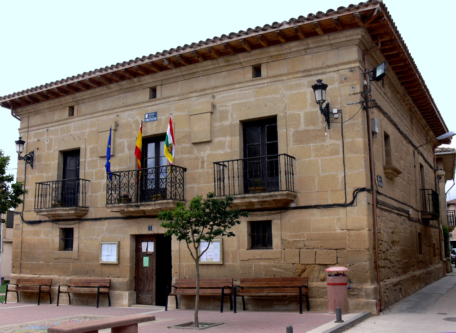 Ayuntamiento de Rodezno en La Rioja, España.